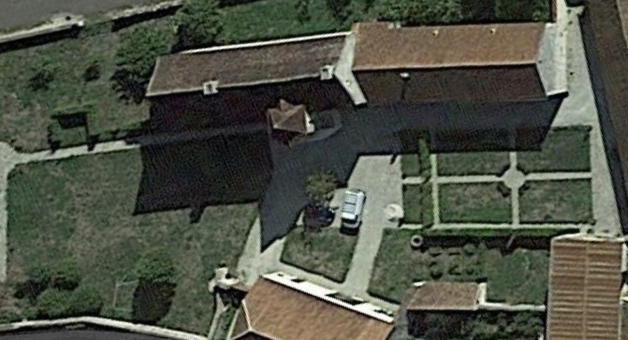 Vue satellite du Manoir de Saint-Vinnemer